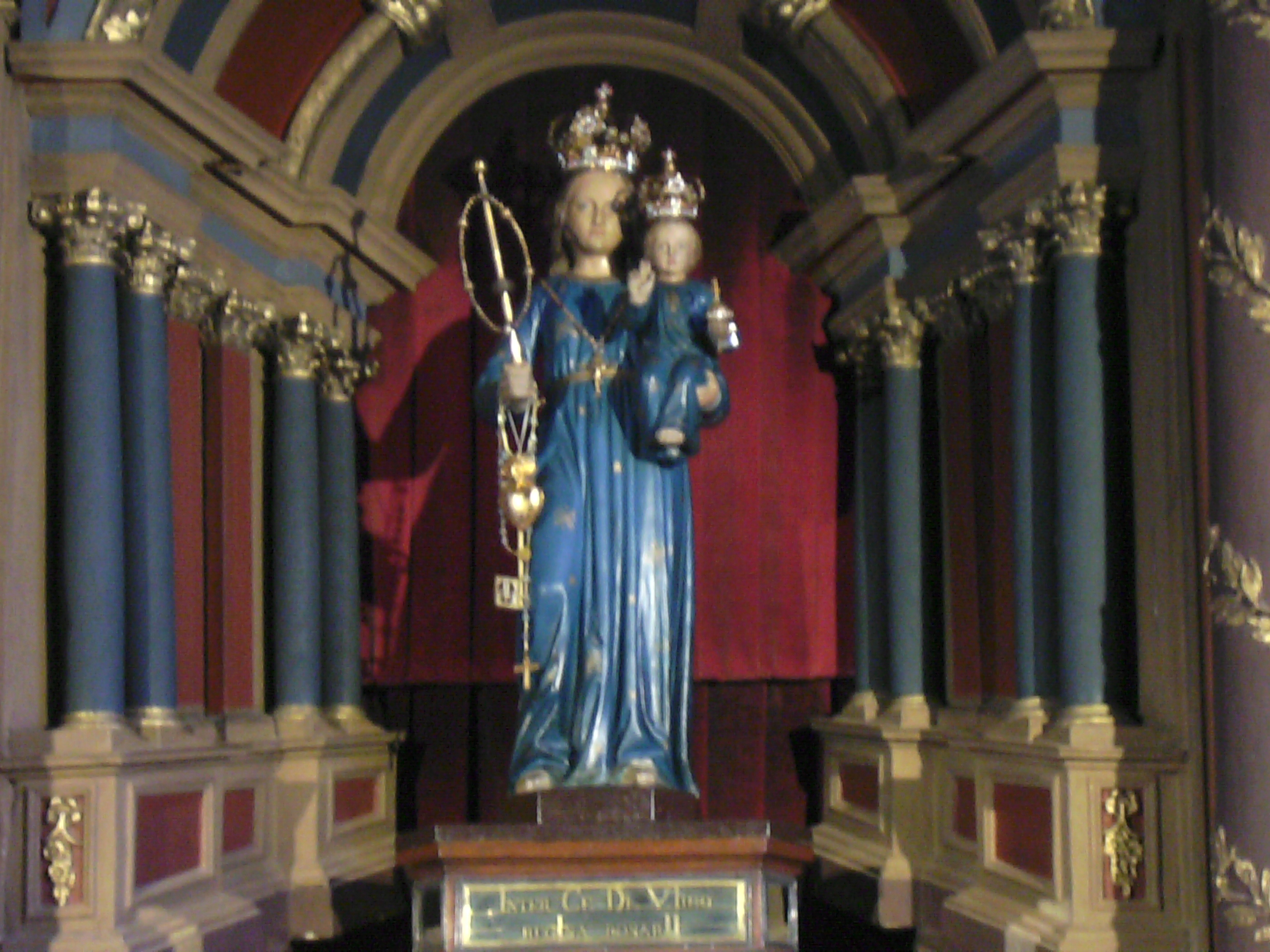 Luxemburg (Stadt): Madonna mit Kind im Seitenschiff der St.-Michaelskirche